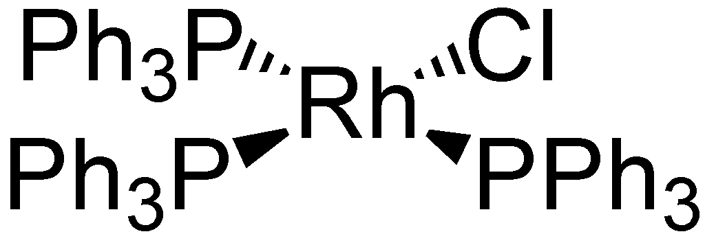 Struktur des Wilkinson-Katalysators